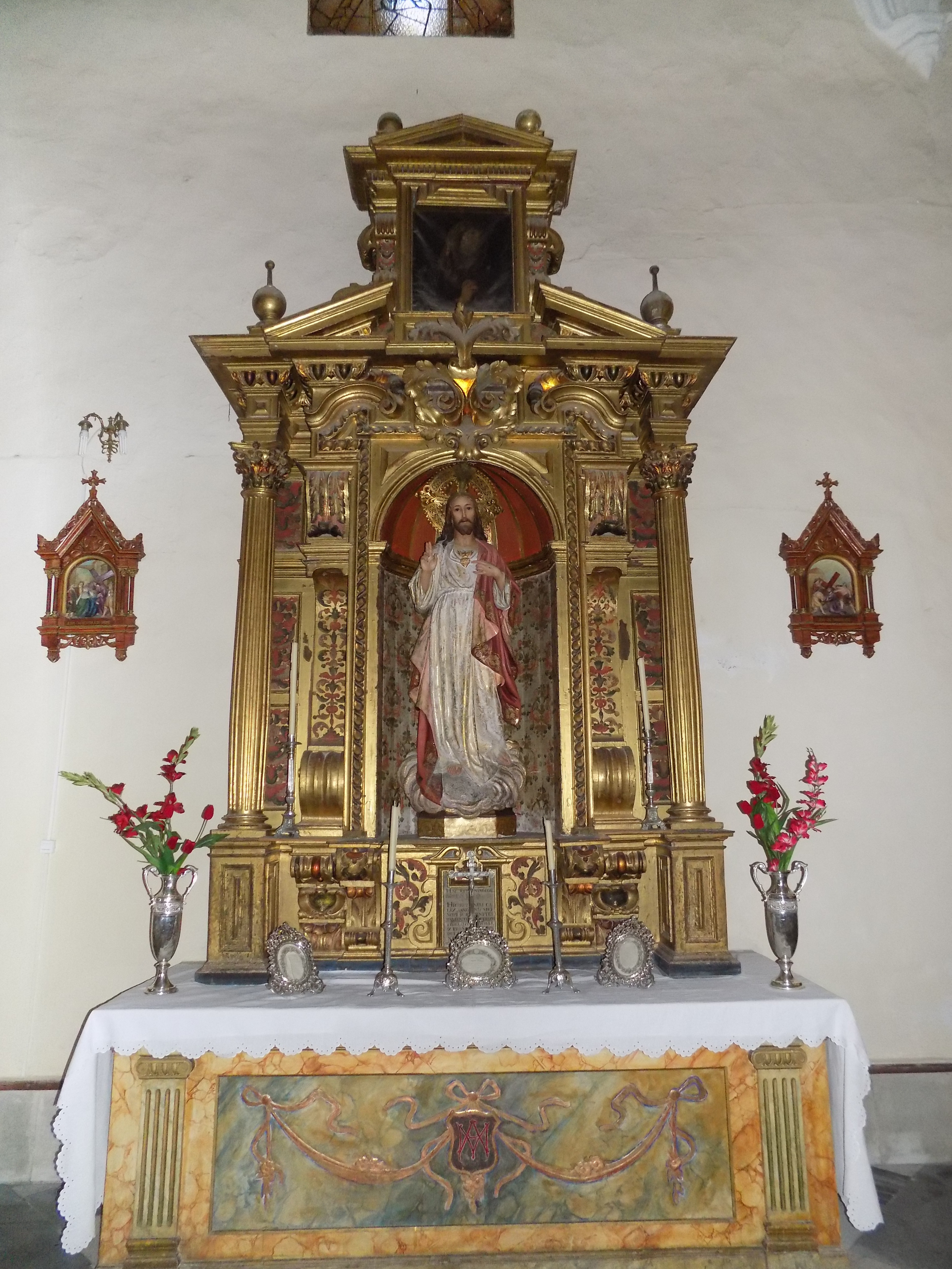 Retablo del Sagrado Corazón de Jesús de la iglesia de Nuestra Señora del Castillo de Fuente Obejuna, provincia de Córdoba, (España).